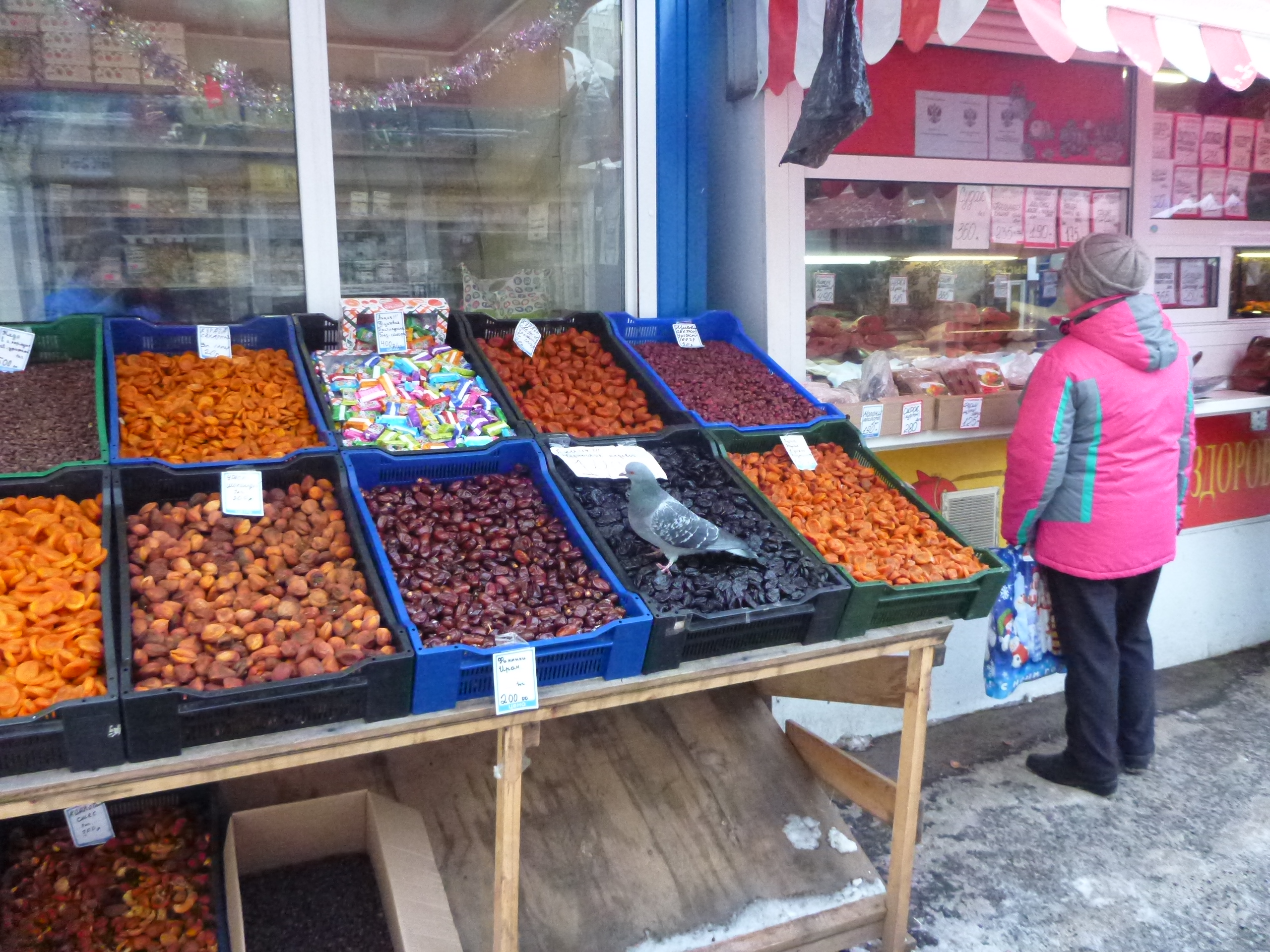 Сизый голубь на рынке сухофруктов на Заводской в Екатеринбурге 2020 год